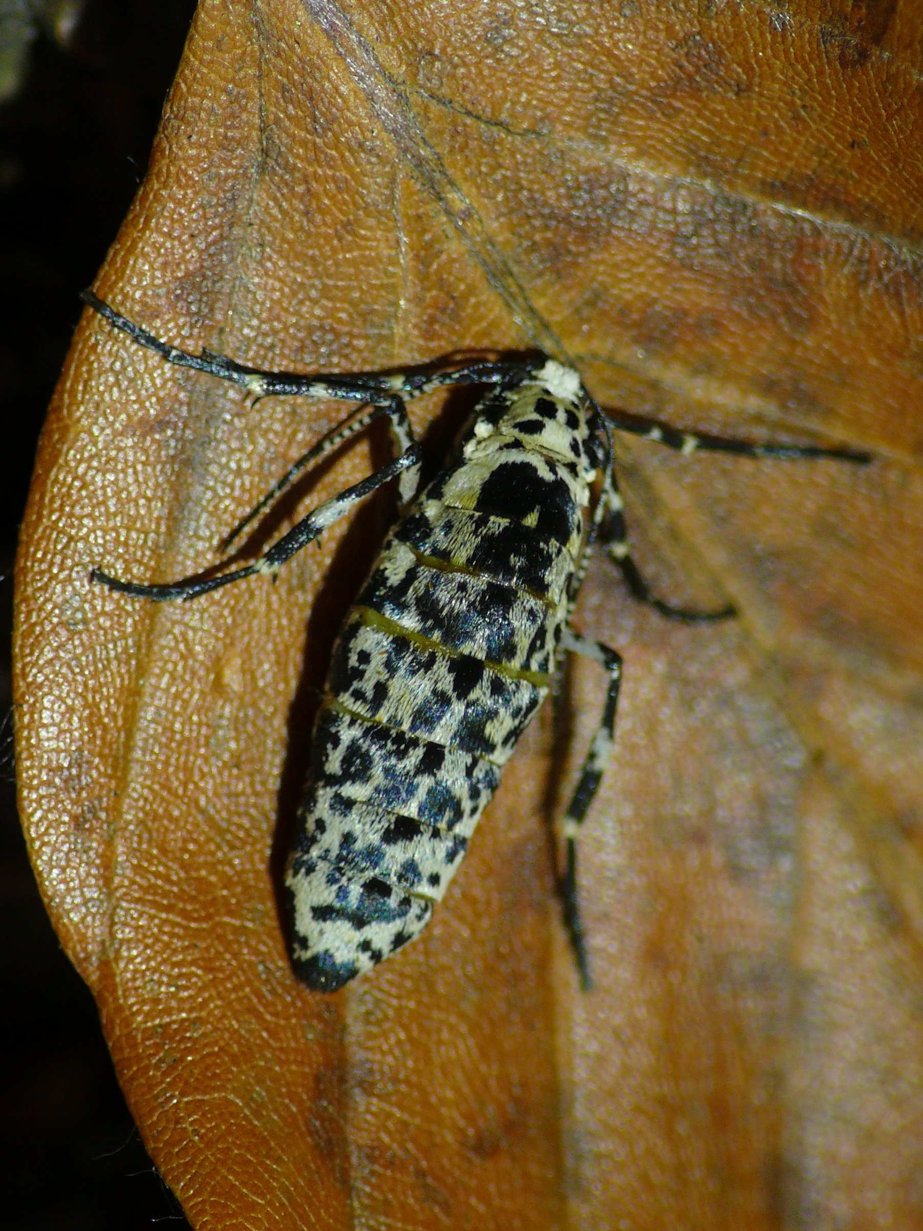 Weibchen des Großen Frostspanners Erannis defoliaria, Perlacher Forst, München Aufgenommen während einer Exkursion des Arbeitskreises Schmetterlinge der Kreisgruppe München beim Landesbund für Vogelschutz (LBV).